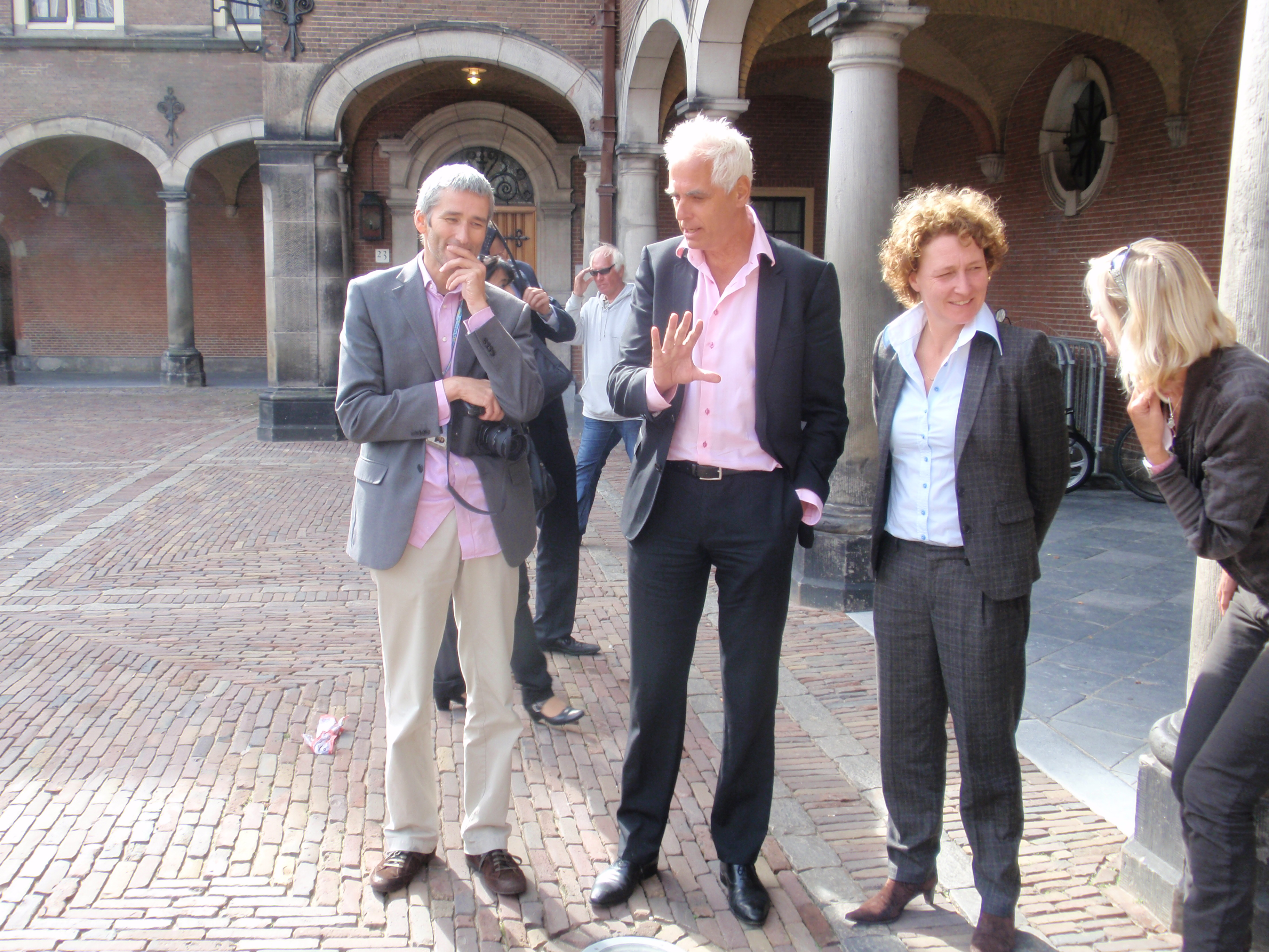 Enkele parlementair verslaggevers tijdens de kabinetsformatie 2010 op het Binnenhof in afwachting van de onderhandelaars bij de ingang van de Eerste Kamer. In het midden Ron Fresen en Dominique van der Heyde.